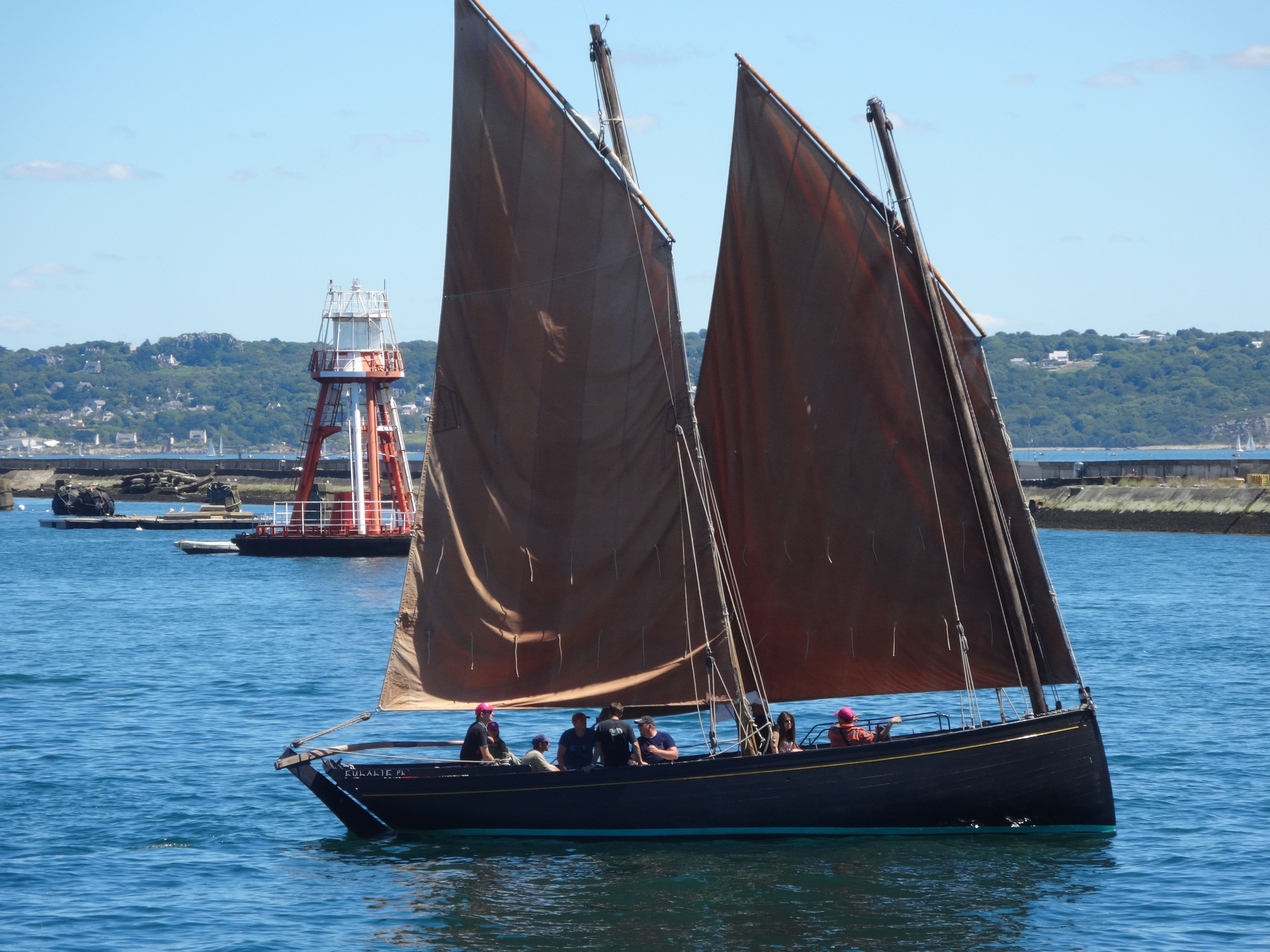 La chaloupe sardinière Eulalie aux fêtes internationales de Brest 2016